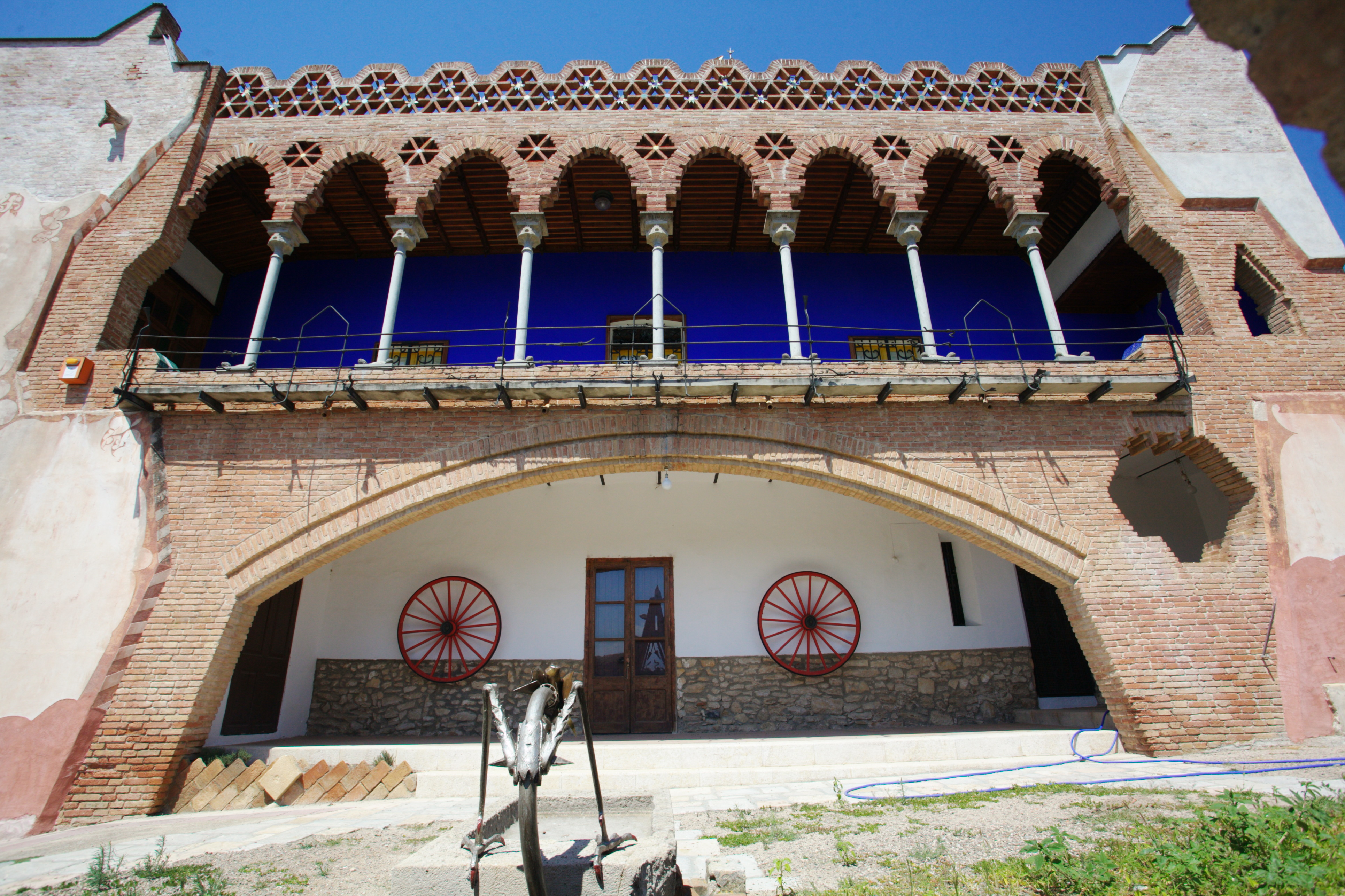 Casa Bofarull, obra de Josep Maria Jujol. Els Pallaresos (Tarragonés, Catalonia)